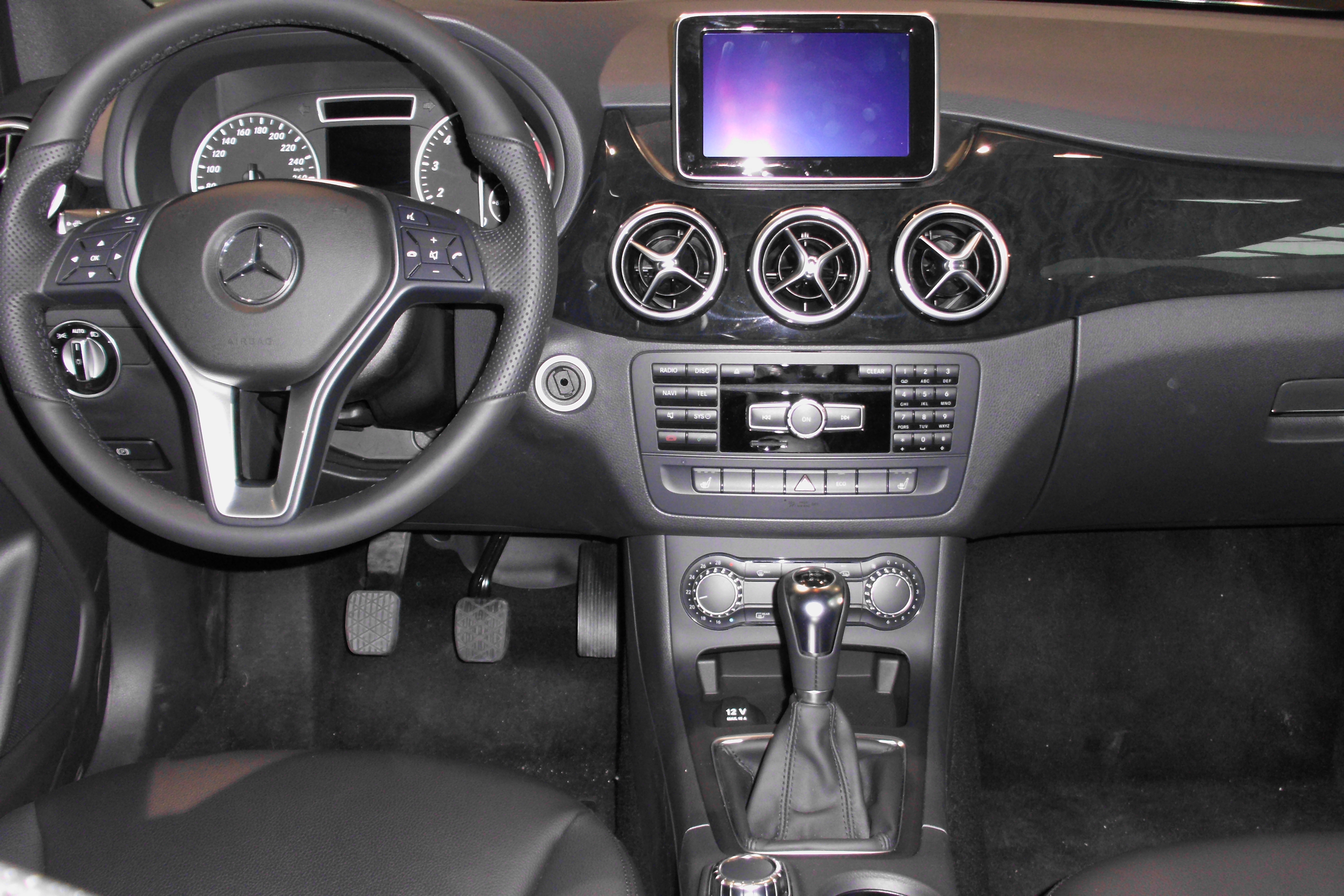 Armaturen eines Mercedes-Benz B 200 (W245)